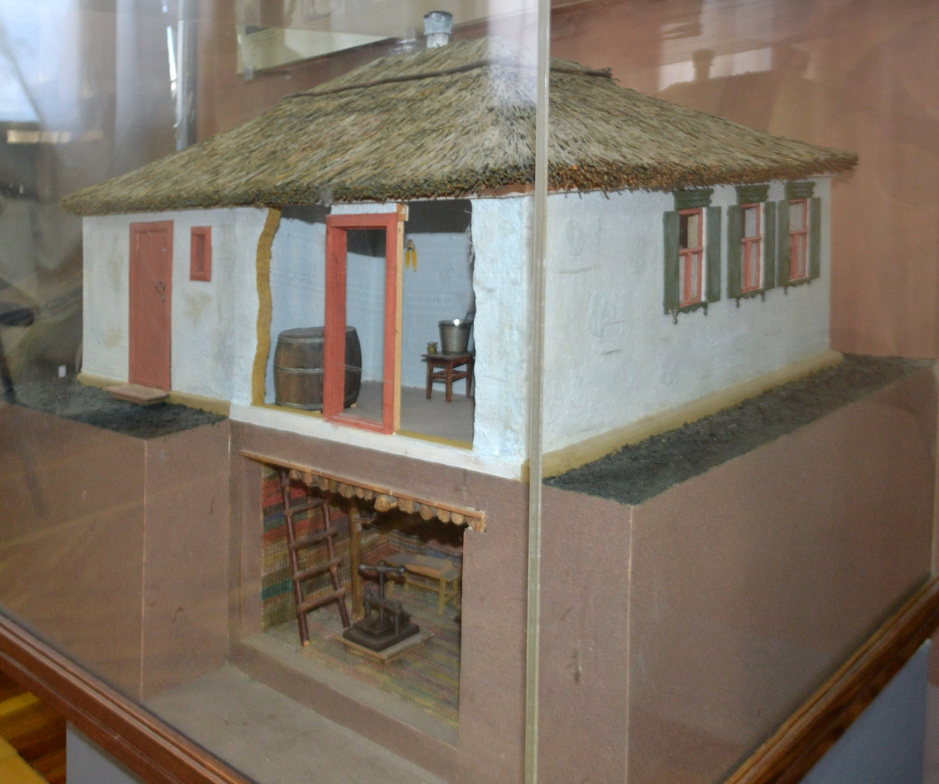 Макет подпольной типографии в Азовском историко-археологическом и палеонтологическом музее-заповеднике.